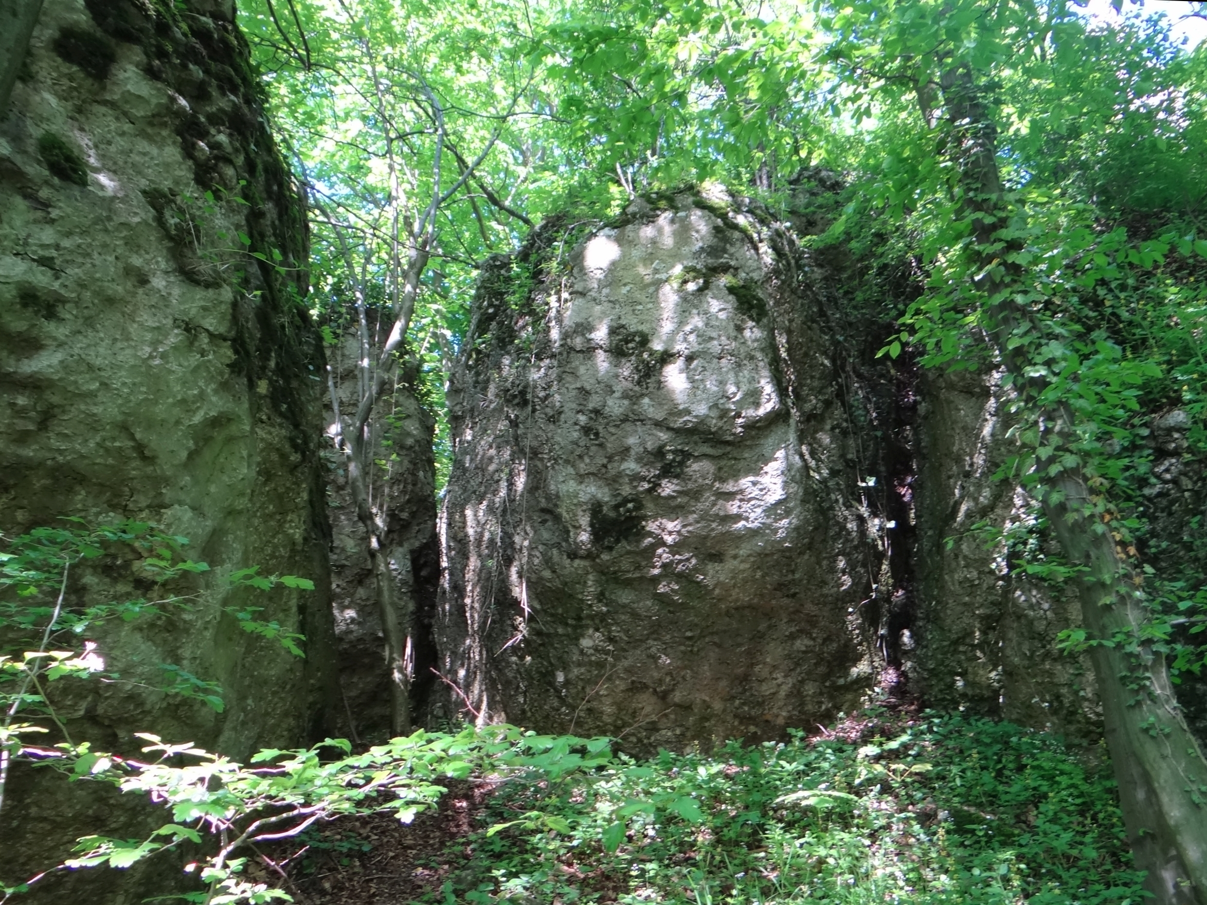 Bukowa Skała w Dolinie Szklarki